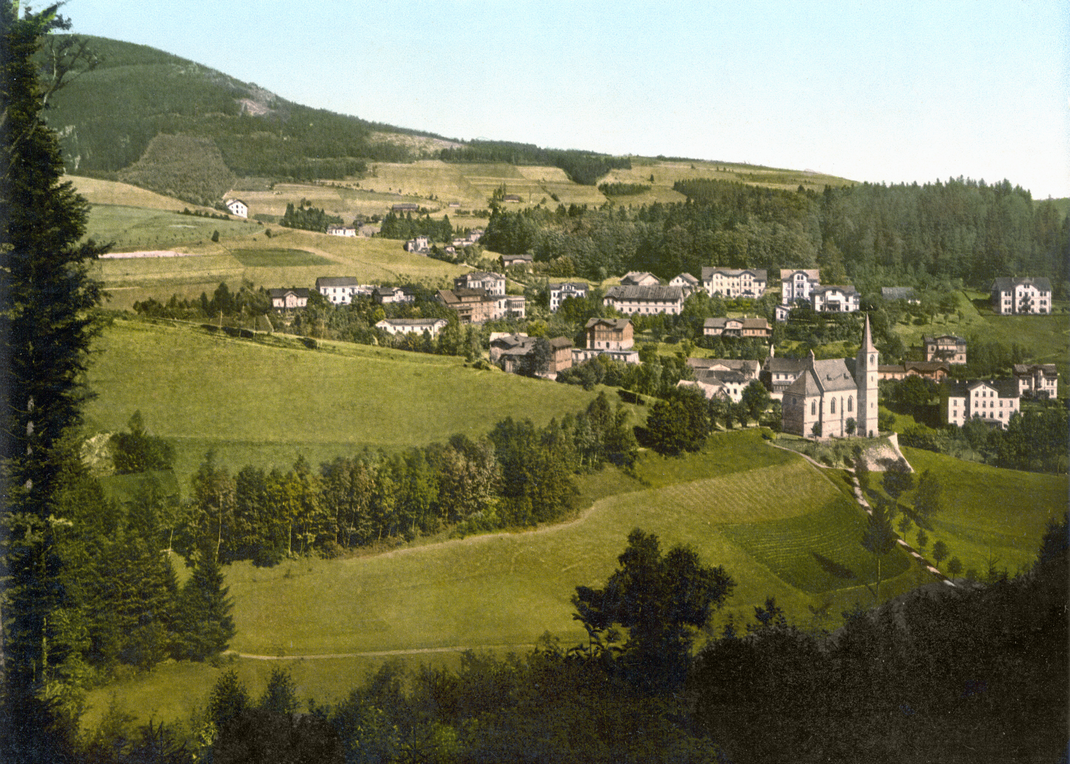 Johannisbad